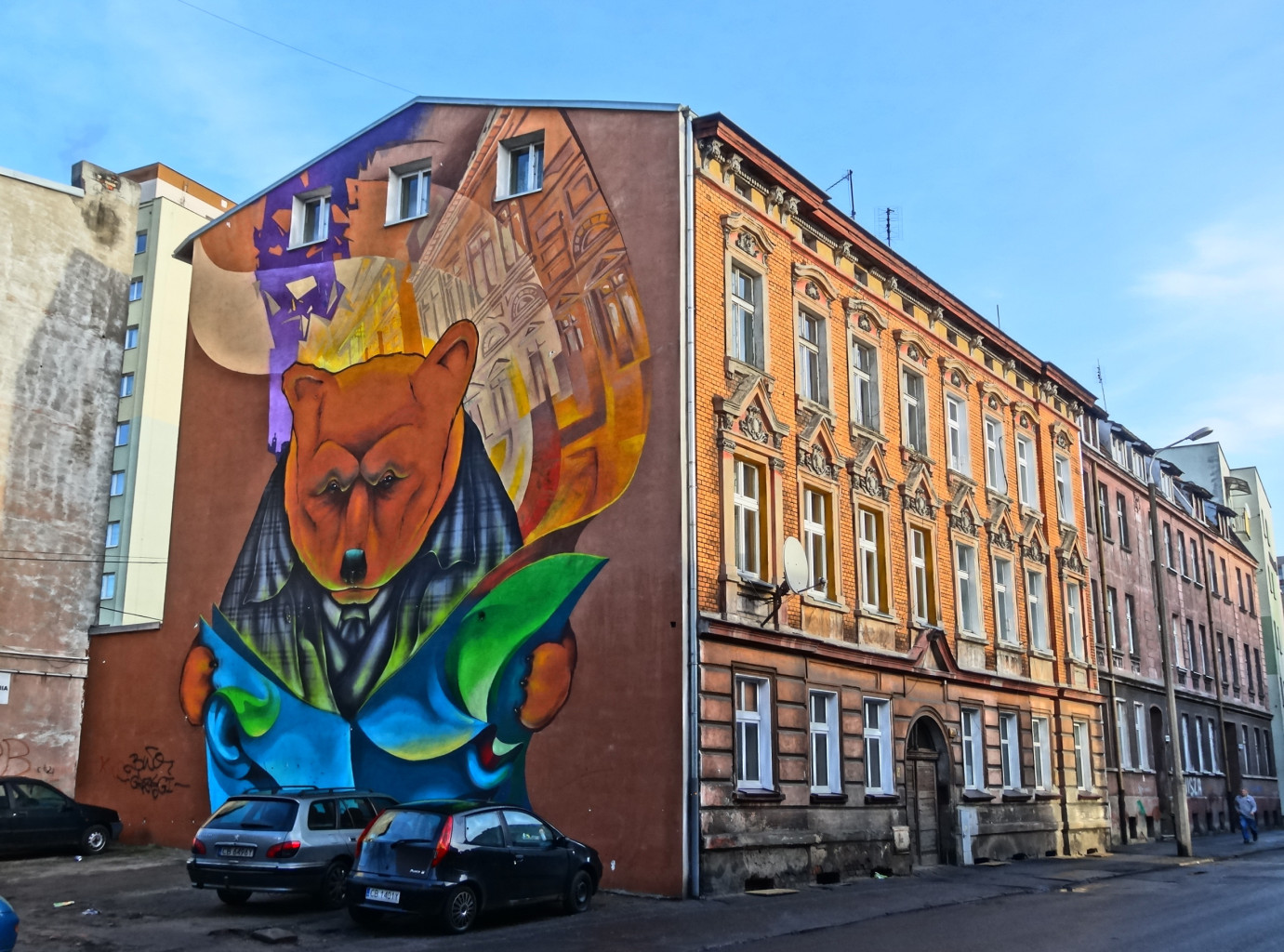 Kamienica ul. Bocianowo 24 w Bydgoszczy (1895-1896)